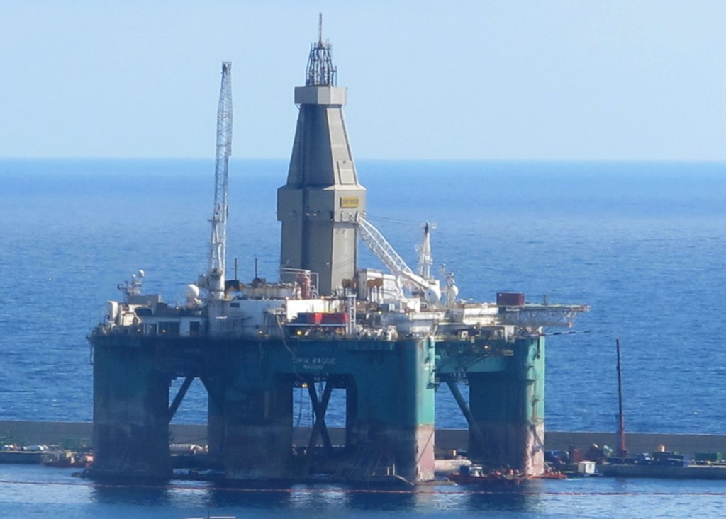 La Plataforma petrolifera "Eirik Raude" en el muelle Reina Sofía del puerto de La Luz y Las Palmas de Gran Canaria. Una de las plataformas petrolíferas flotante más grande del mundo, "Eirik Raude",llegó el pasado lunes al puerto de Las Palmas de Gran Canaria, donde permanecerá unos dos meses para una revisión y puesta a punto general. Esta plataforma pesa más de 37.000 toneladas, mide casi 120 metros de alto por 110 de eslora y 80 de manga y su magnitud obligó a una maniobra de atraque de casi dos días, en el dique Reina Sofía, lugar donde permanecerá hasta su marcha. Su propietaria es la empresa Ocean Rig y está previsto que en su reparación intervengan gran número de empresas del puerto de Las Palmas de Gran Canaria. Eirik Raude se completó en 2002 como una unidad de perforación de quinta generación semi-sumergible construido para el Bingo 9000 de diseño. El casco fue construido en el astillero de Dalian en China, con equipamiento en los EE.UU. por Friede Goldman costa afuera y en Canadá por Irving Astillero de Halifax. Este equipo está diseñado para llevar a cabo las operaciones de perforación en aguas profundas hasta 10 000 pies. Eirik Raude se mantiene estable en condiciones climáticas adversas debido a sus características de movimiento superiores y avanzados sistemas de posicionamiento dinámico. La plataforma está totalmente preparadas para el invierno durante todo el año para operaciones en zonas climáticas extremas, tales como costa afuera de Canadá (Nueva Escocia y Terranova) y en el mar del norte de Noruega (Barents Mar). Eirik Raude se ha actualizado recientemente con un sistema de amarre de 8 puntos. El equipo de perforación perforado 4 pozos en el Mar de Barents bajo extremas condiciones climáticas adversas. Fuente y más información : Fotografías : Ver el video